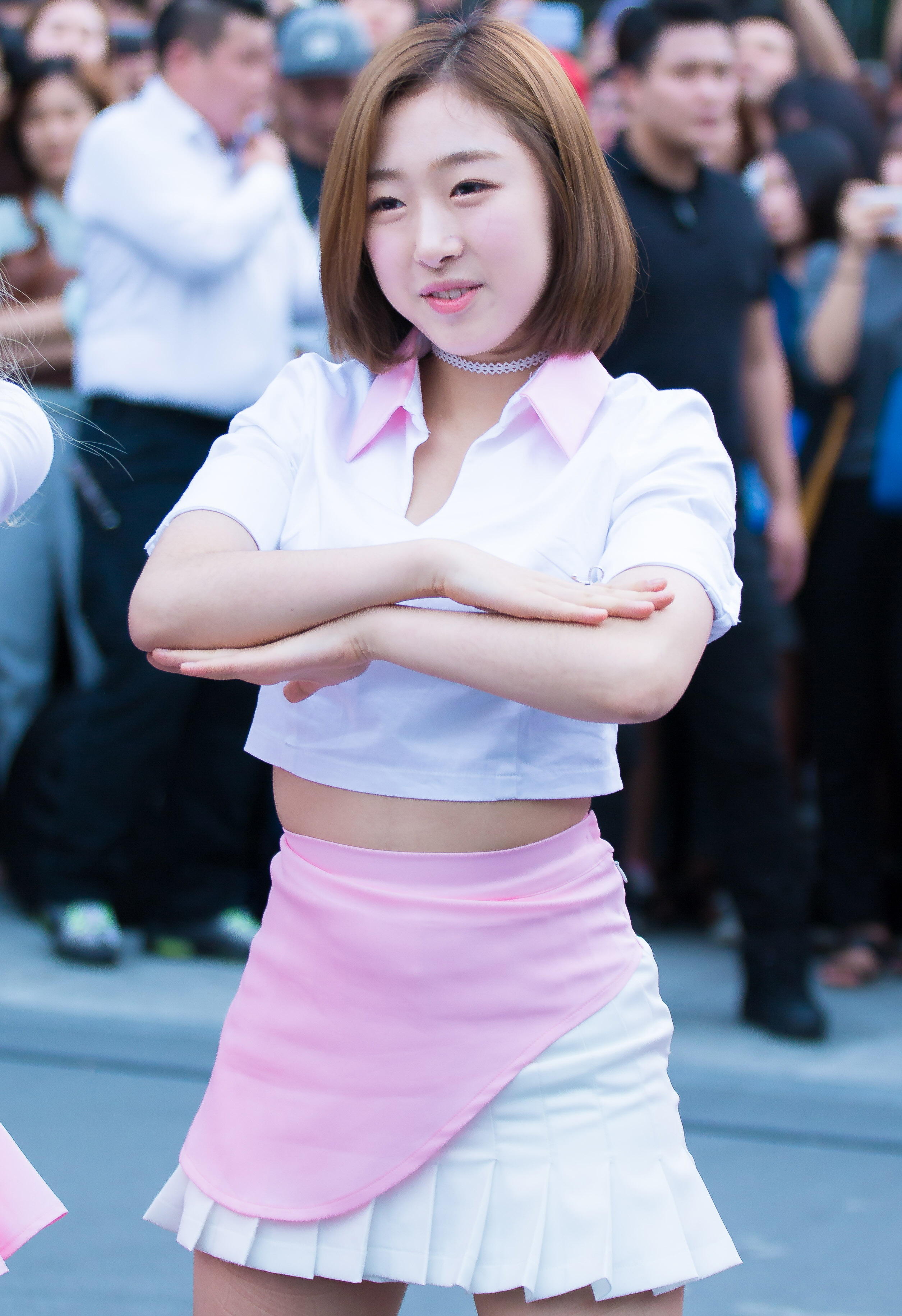 20160910 우주소녀 신촌 게릴라 공연